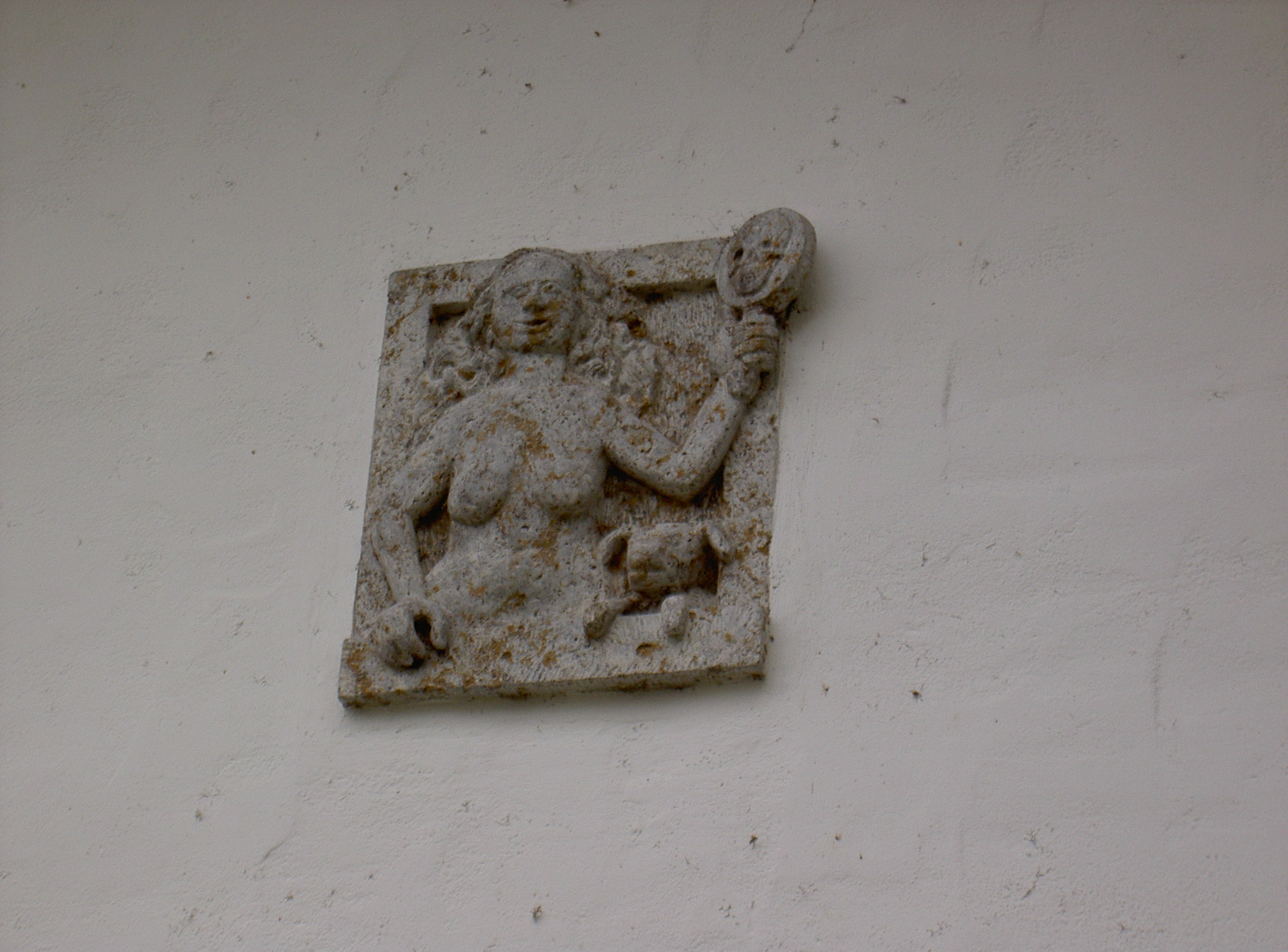 ChamSPUR Museum Relief